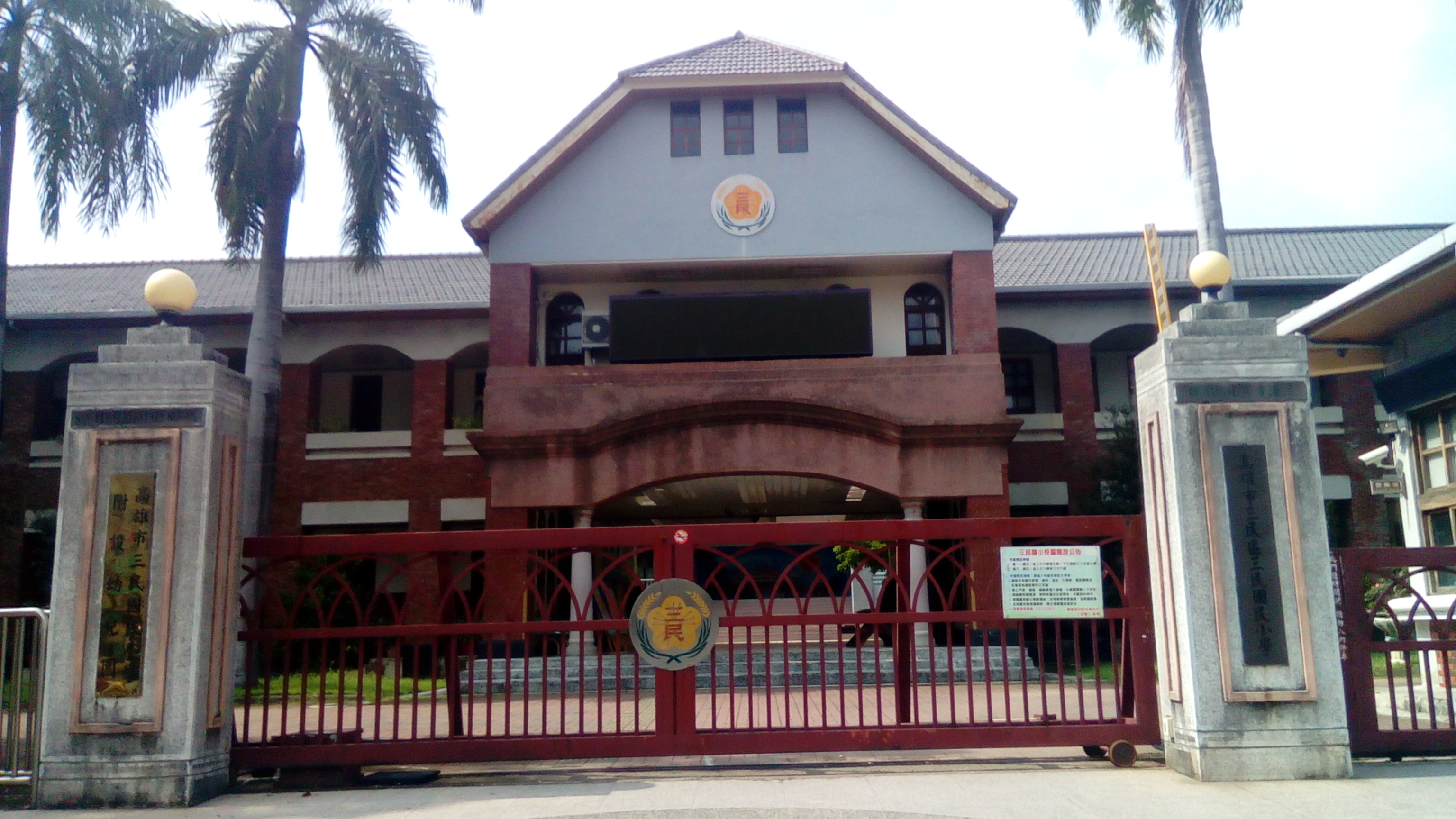 位於三民區建國路與中華路口一帶